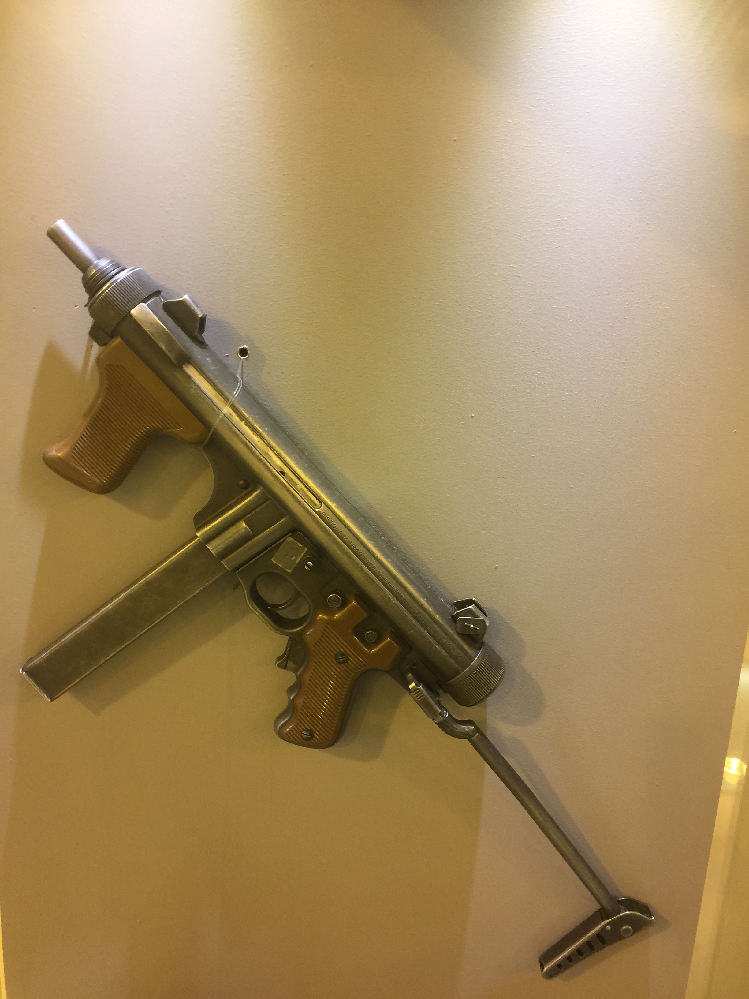 سلاح في معرض قوات الأمن الخاصة.